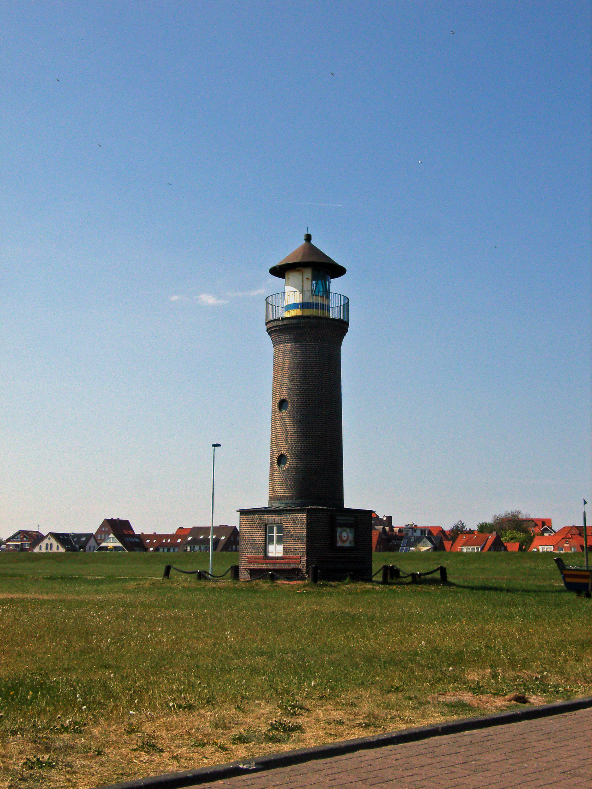 Leuchtturm („Memmertfeuer“) auf Juist (Niedersachsen)